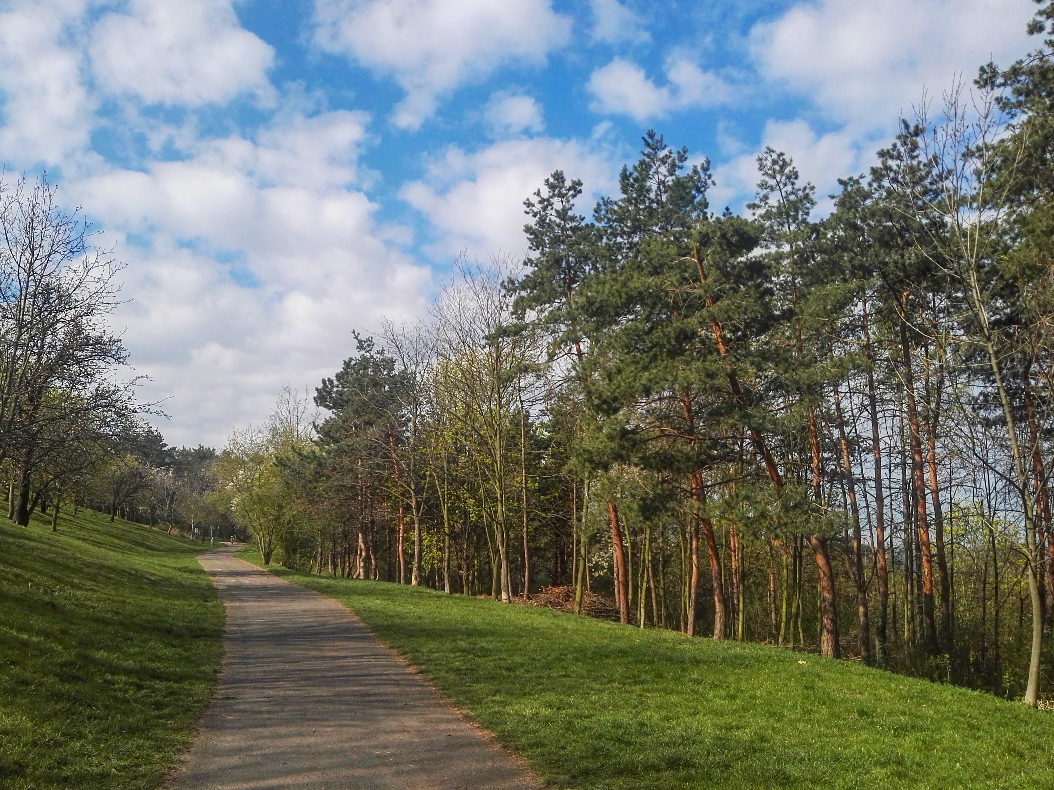 Les Krejcárek, parková úprava u středové cesty